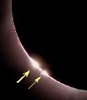 dettaglio dei grani di Baily durante un eclissi totale di sole